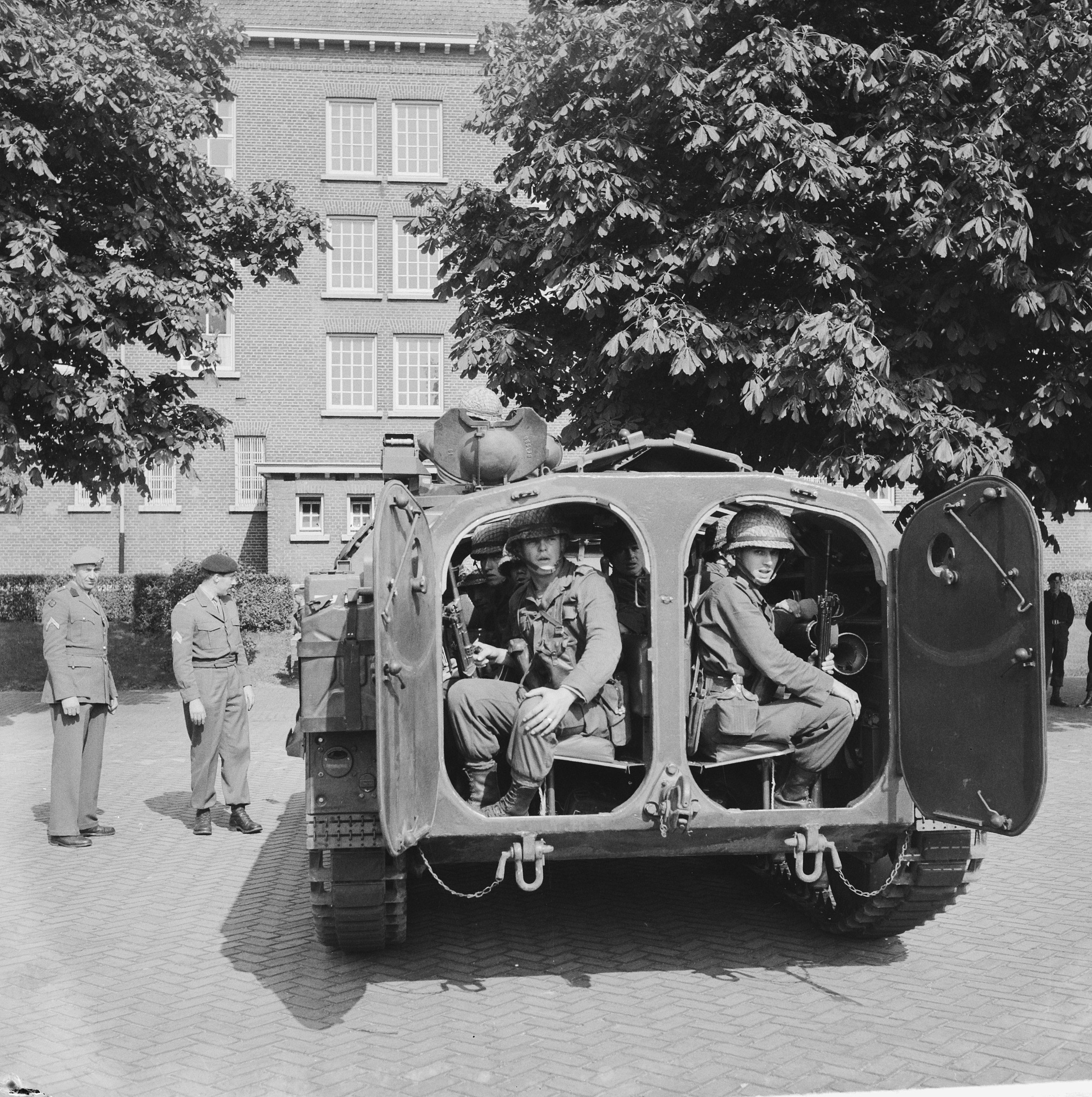 Collectie / Archief : Fotocollectie Anefo Reportage / Serie : [ onbekend ] Beschrijving : Dag der Infanterie in de Isabellakazerne te Den Bosch , AMX-gepantserde personenwagen Datum : 13 september 1962 Locatie : Den Bosch Trefwoorden : INFANTERIE, militairen Persoonsnaam : Isabellakazerne Fotograaf : Nijs, Jac. de / Anefo Auteursrechthebbende : Nationaal Archief Materiaalsoort : Negatief (zwart/wit) Nummer archiefinventaris : bekijk toegang 2.24.01.03 Bestanddeelnummer : 914-3102